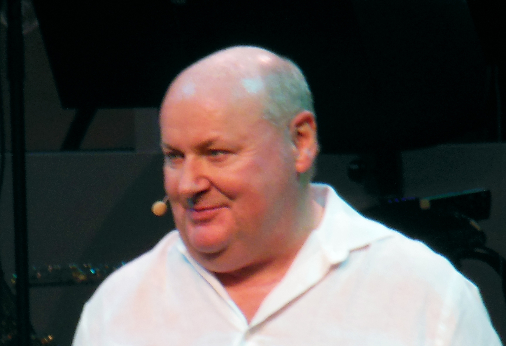 Knut Agnred i applådtacket efter en publikrepetition av föreställningen Spargrisarna kan rädda världen, 23 september 2015.